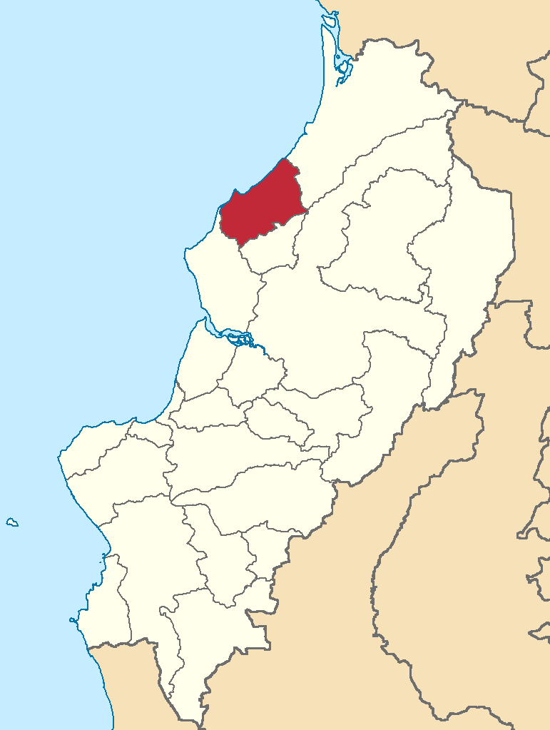 Mapa localizador del cantón en Manabí, Ecuador